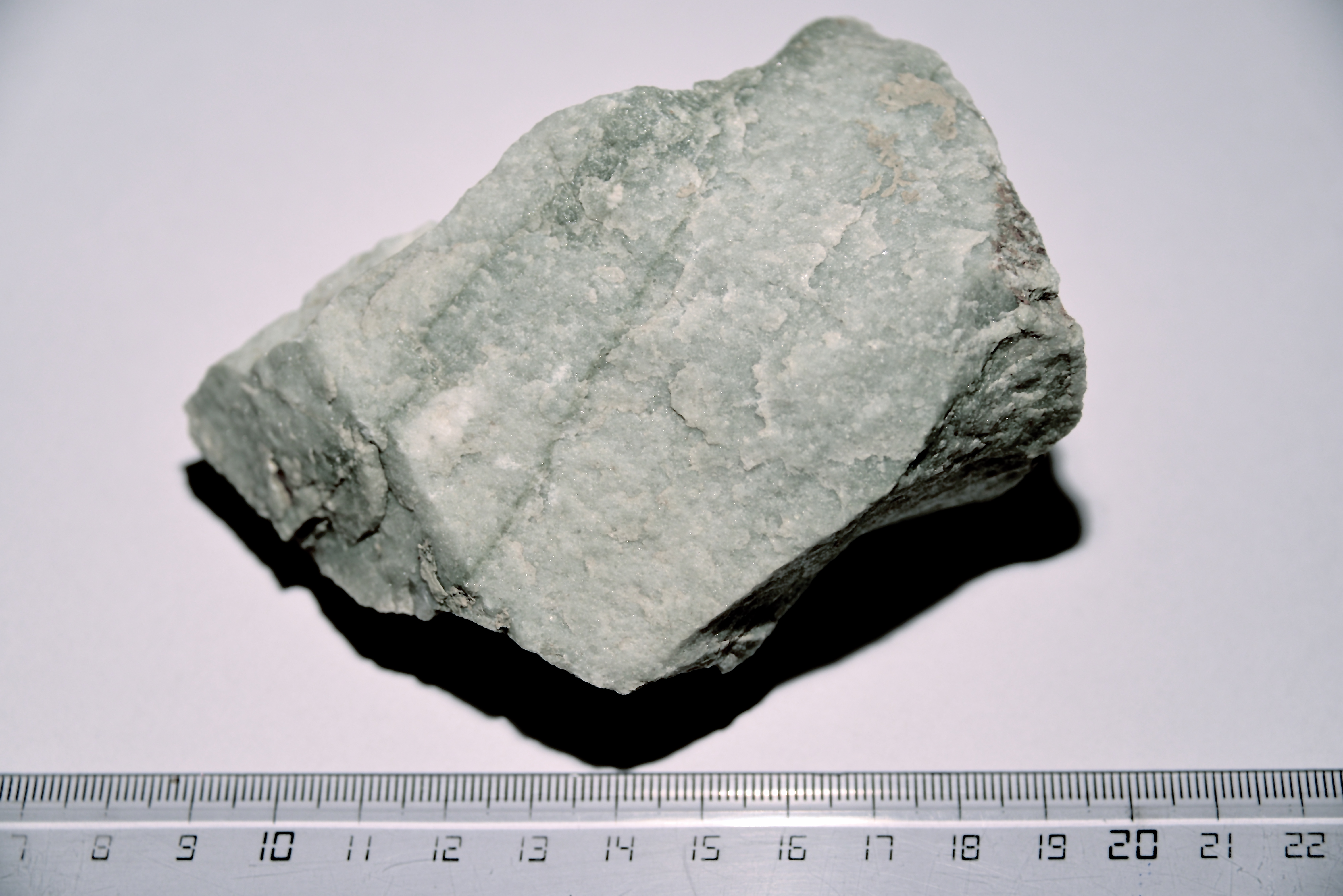 Quartzite bleuté à niveaux phylliteux (phengite, chlorite), provenant des pentes de la Dent Parrachée, Sollières, Haute Maurienne, Vanoise